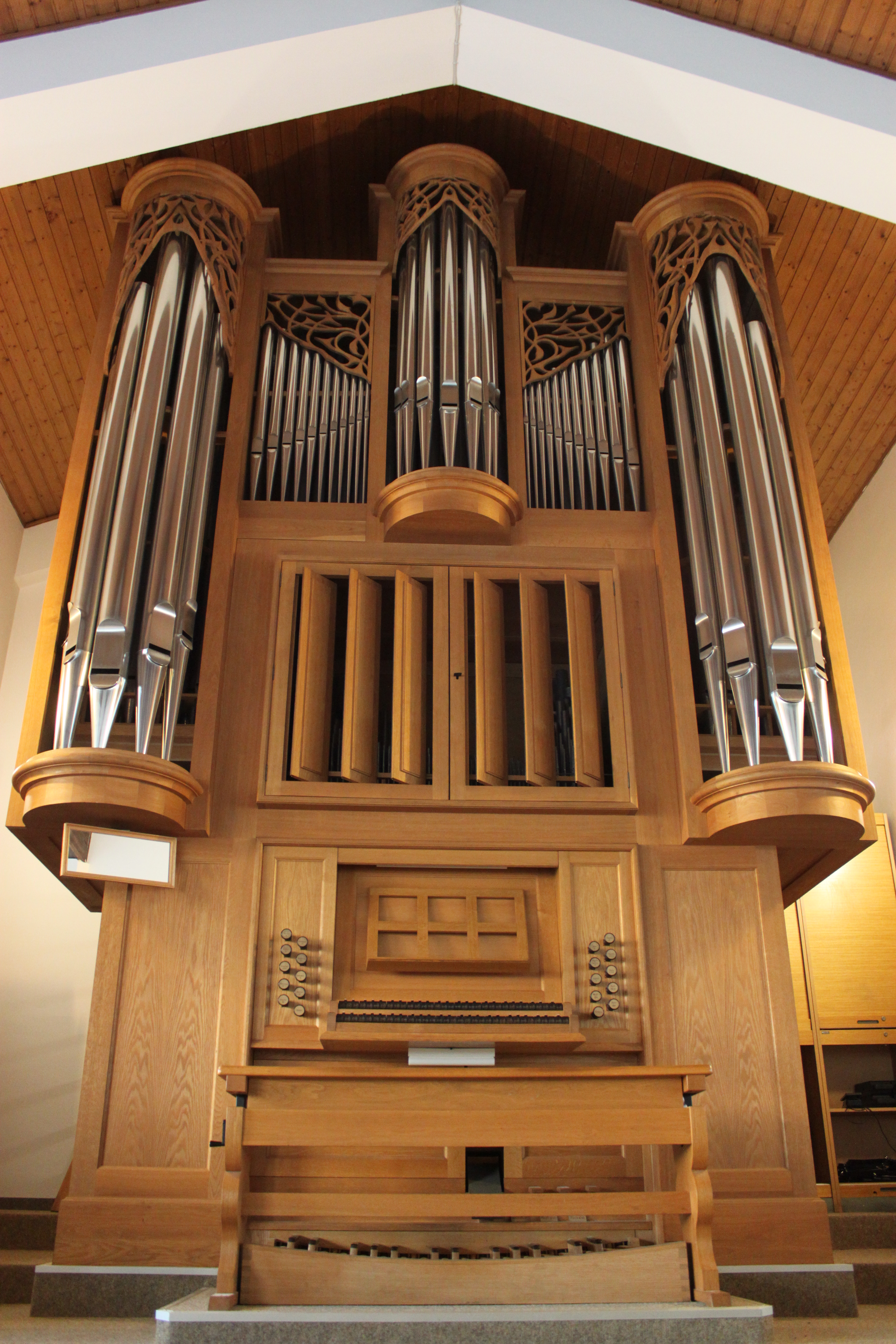 Orgel der evangelischen Markuskirche, Wien 16., errichtet 1985 von Bruno Riedl